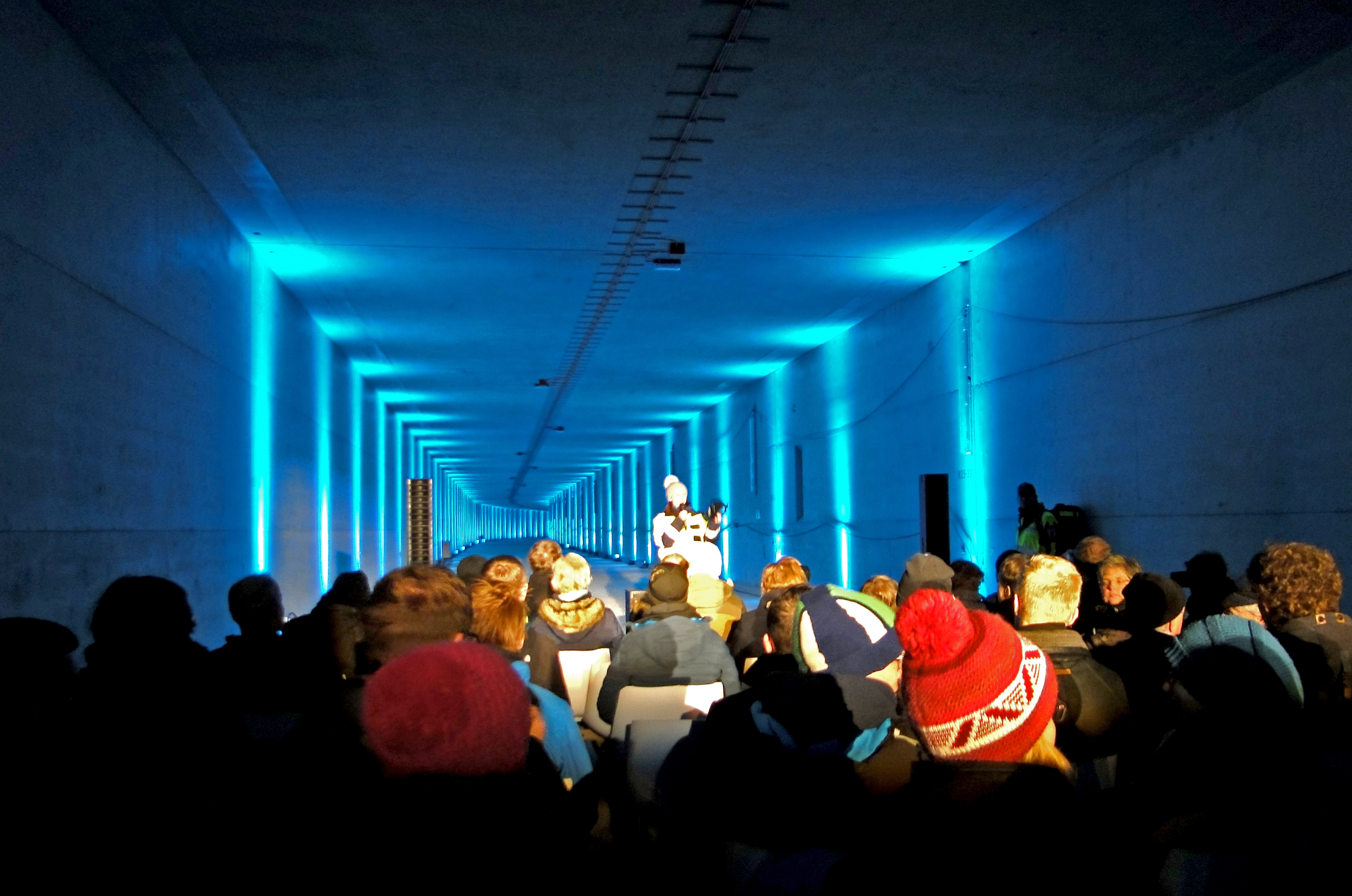 Öffentliche Baustellenbesichtigung der Verlängerung der U-Bahnlinie U4 in der Hamburger HafenCity zwischen den Station U-HafenCity Universität U-Elbbrücken. "Tunneltour U4.0"